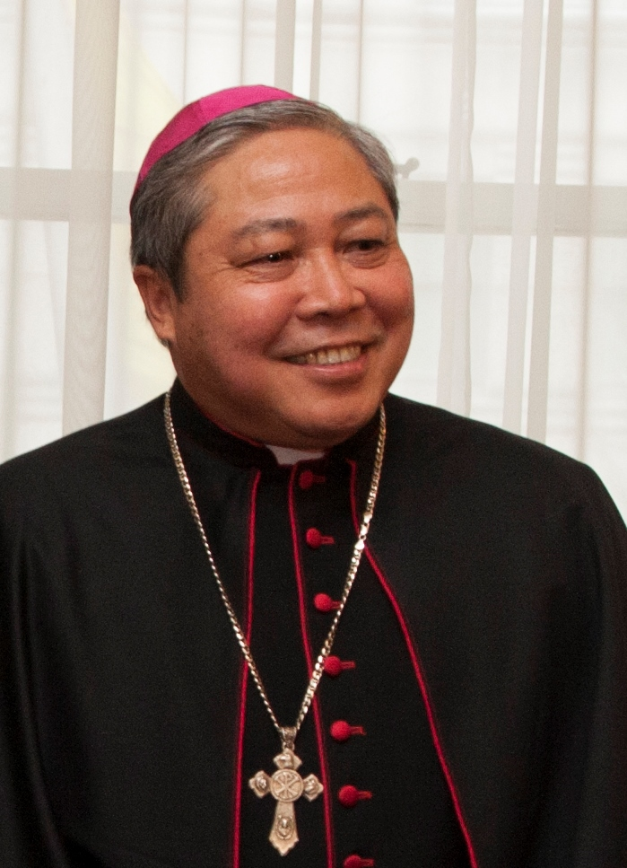 Archbishop Bernardito C. Auza Rabbi Arthur Schneier Papal Knighthood